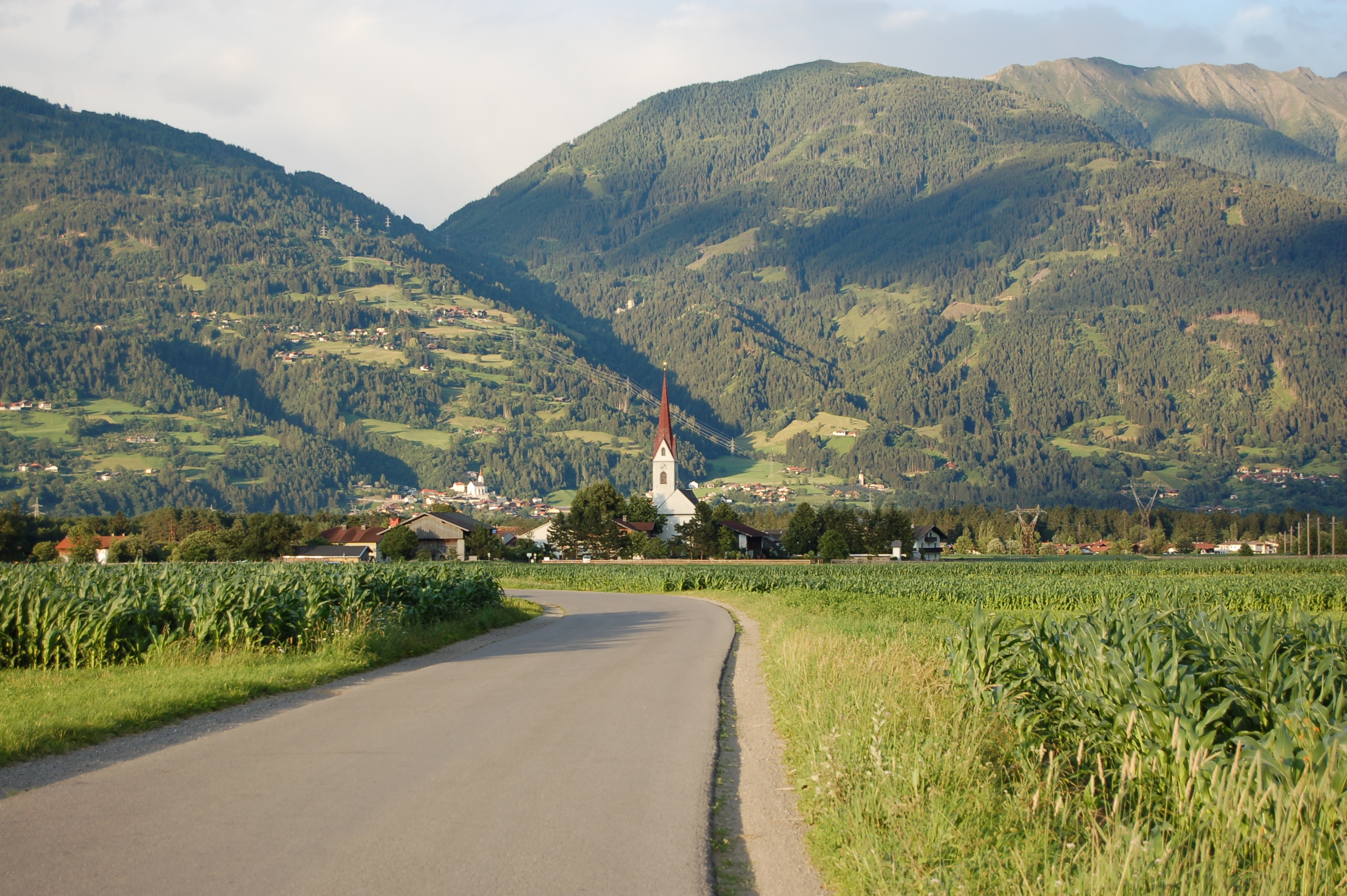 Die Gemeinde Tristach im Bezirk Lienz (Tirol)., gesehen von Westen.